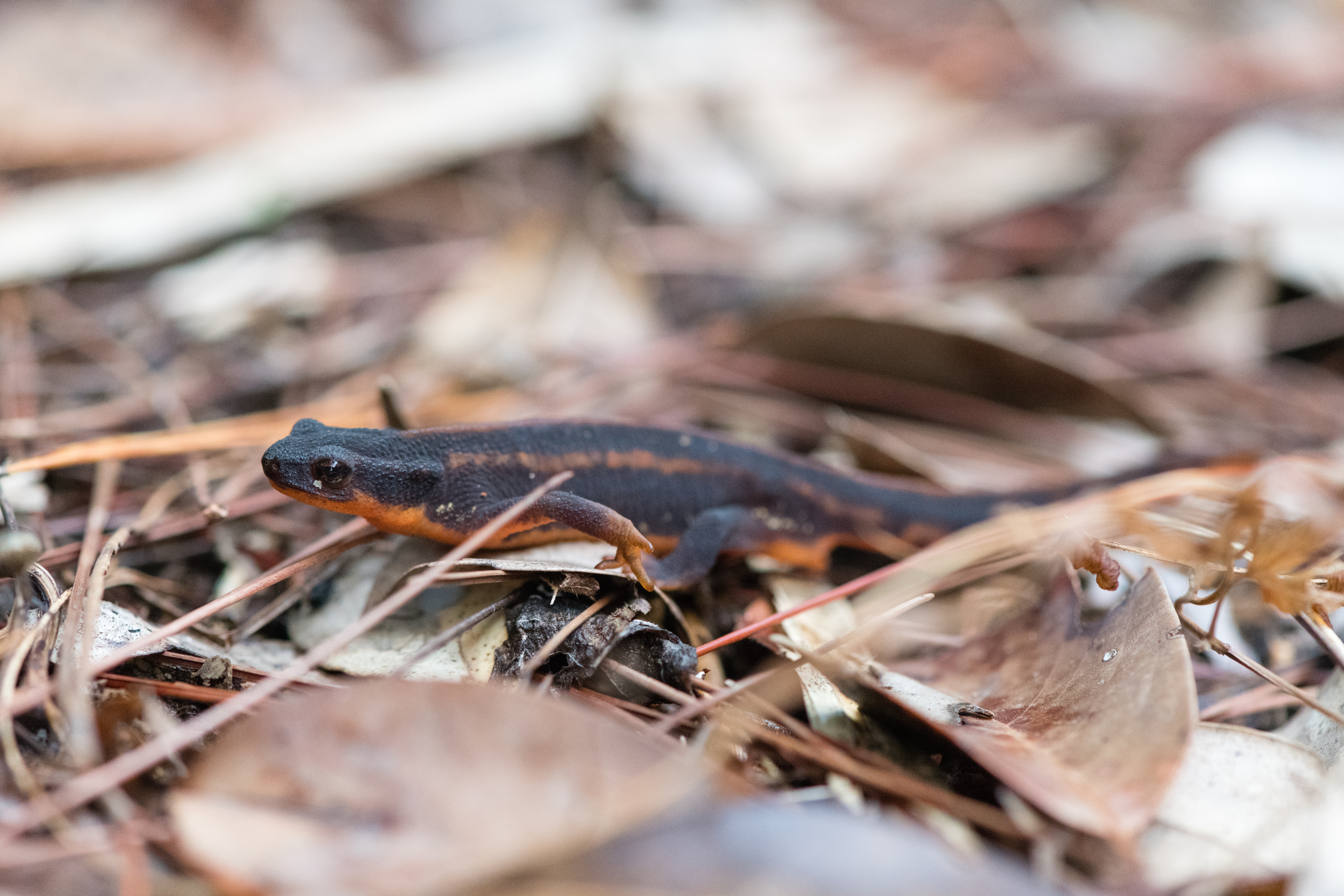 Schwertschwanzmolch am Strassenrand im Yanbaru Nationalpark auf Okinawa